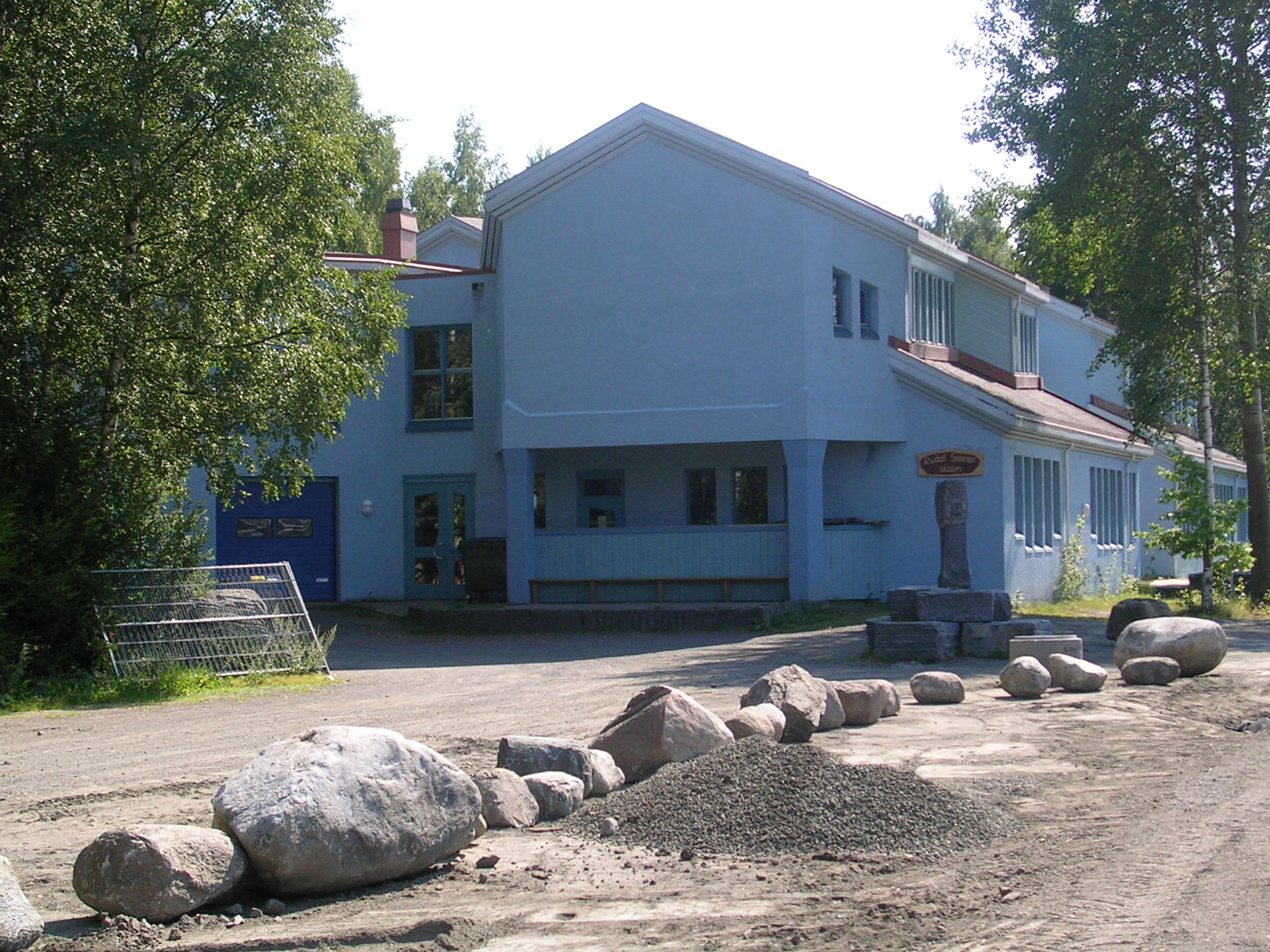 Steinerskolen i Vestfold, i Vestskogen i Nøtterøy kommune